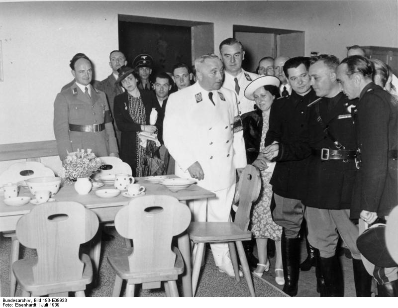 Eröffnung der KdF-Leistungsschau und der Ausstellung in den Zoo-Ausstellungshallen in Hamburg Reichsorganisationsleiter Dr. Ley mit dem Italiener Cianetti beim Rundgang durch die Ausstellung. Fot.: Eis. 22.7.1939 E 8933 Cianetti 2. von rechts.